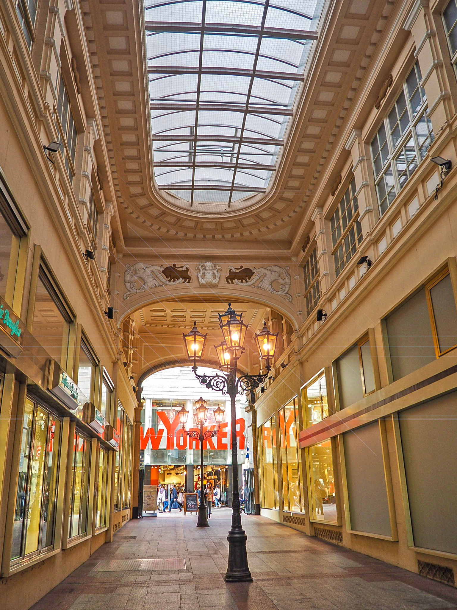 Krügerpassage am Westenhellweg